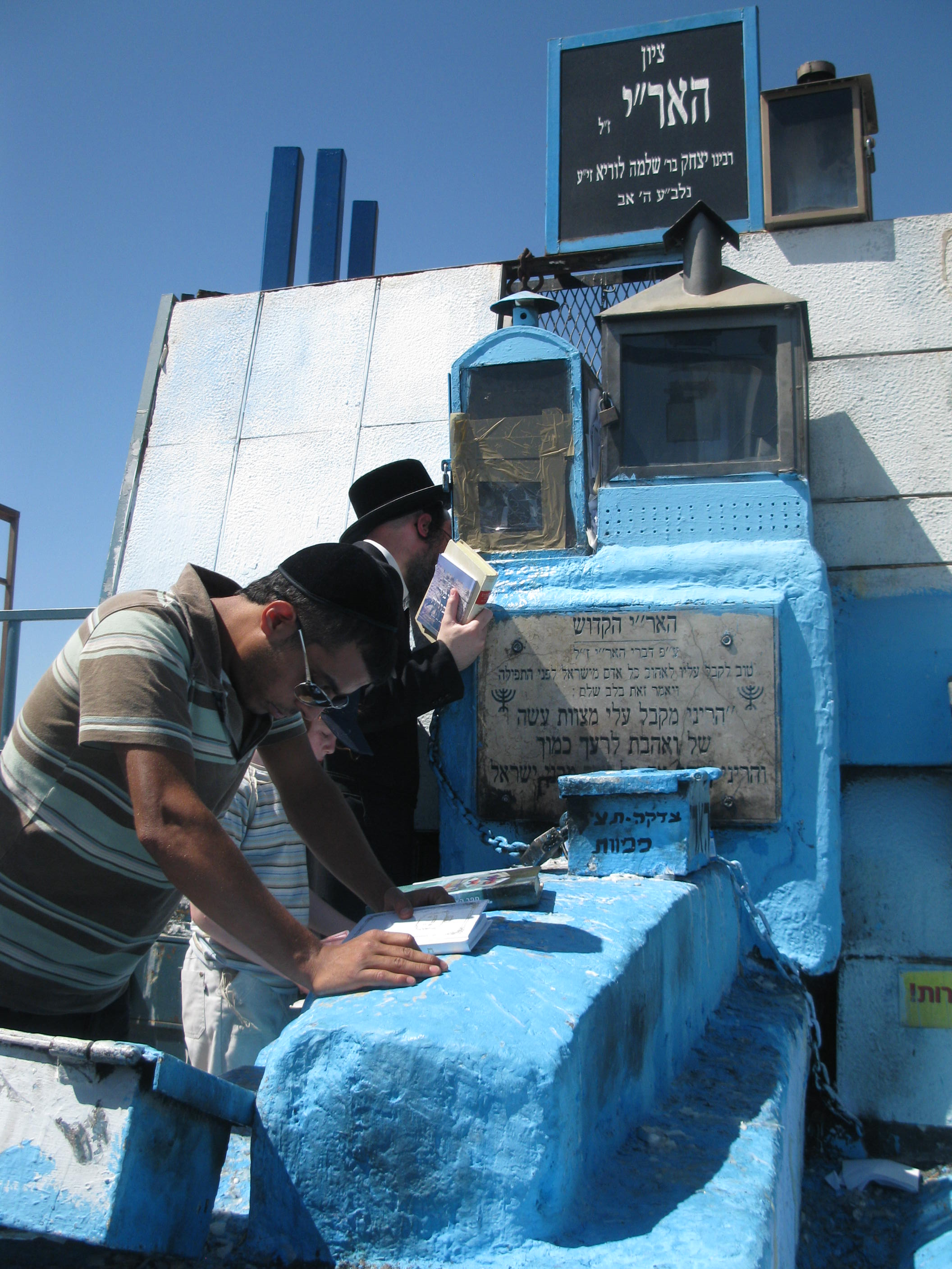 קבר רבי משה שצוין בטעות לאביו